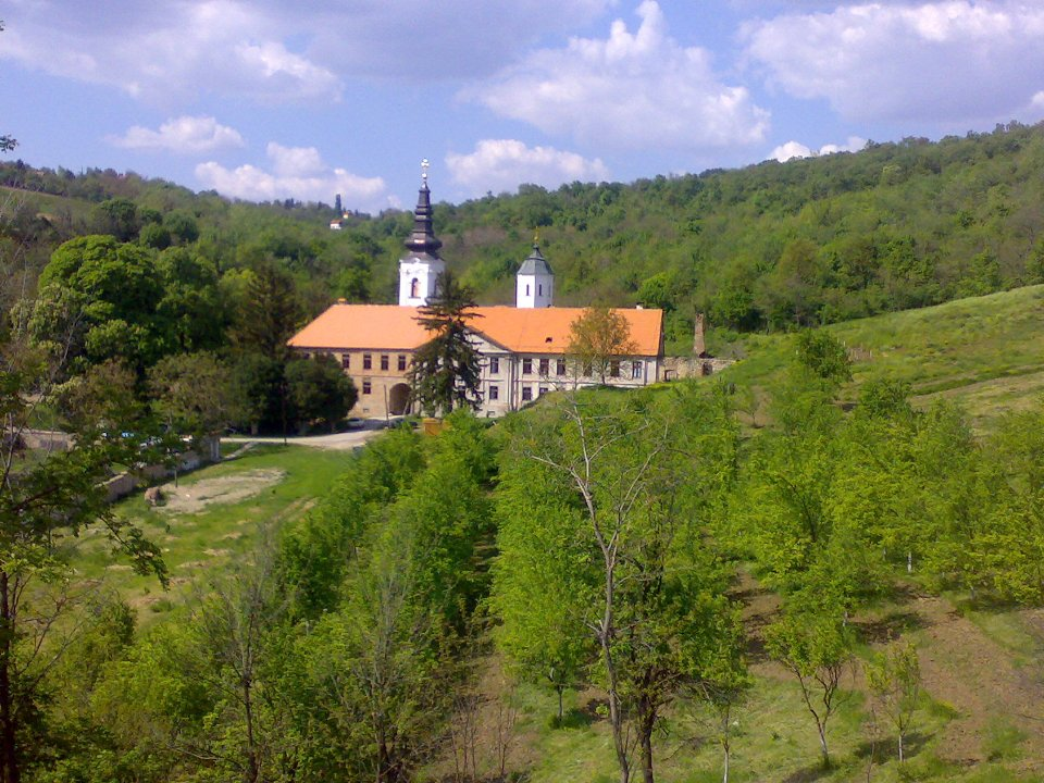 Manasti Kuveždin